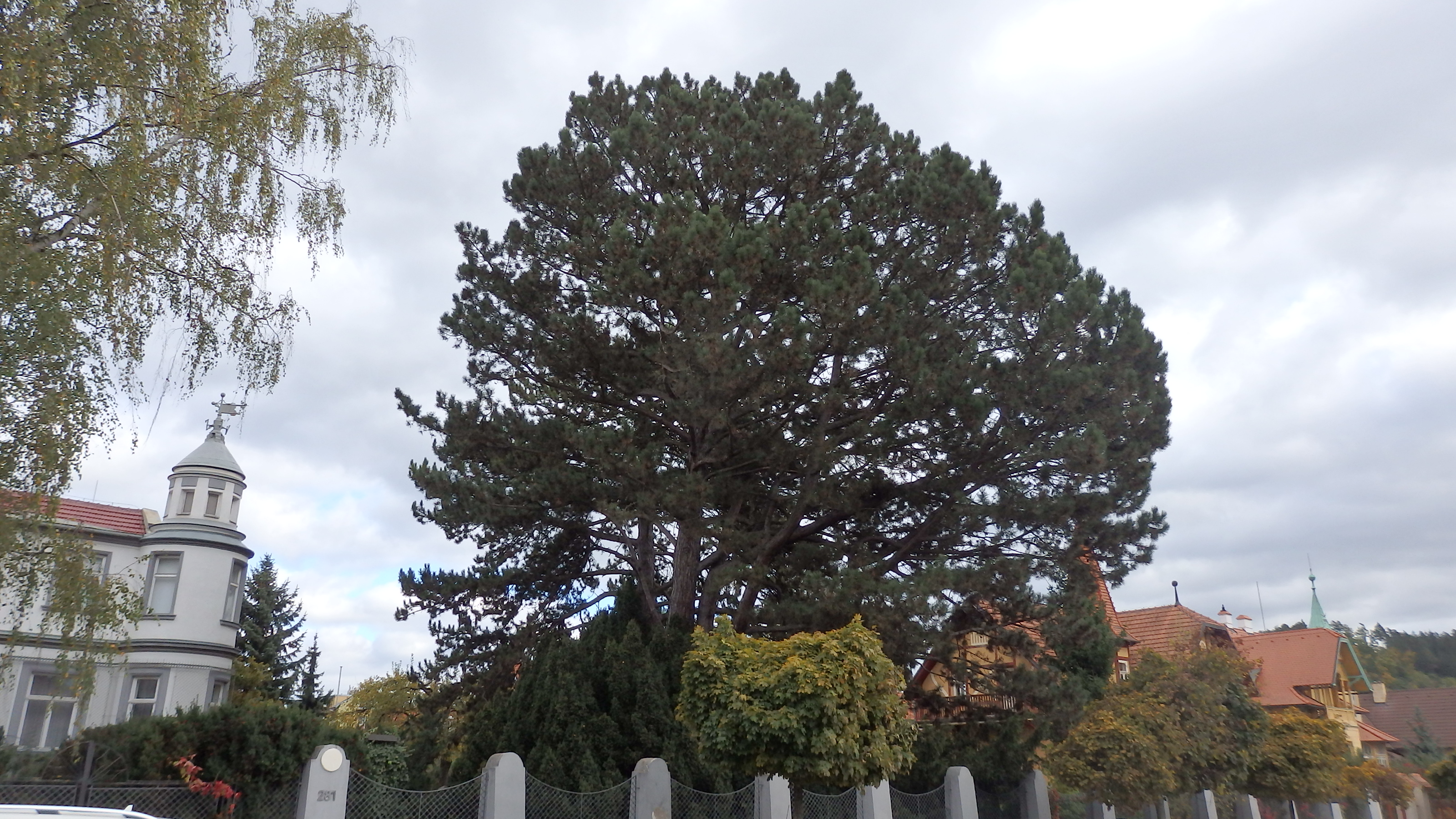 Tišnov, vila Franke, Riegrova 281, památné stromy - borovice černé (Pinus nigra)